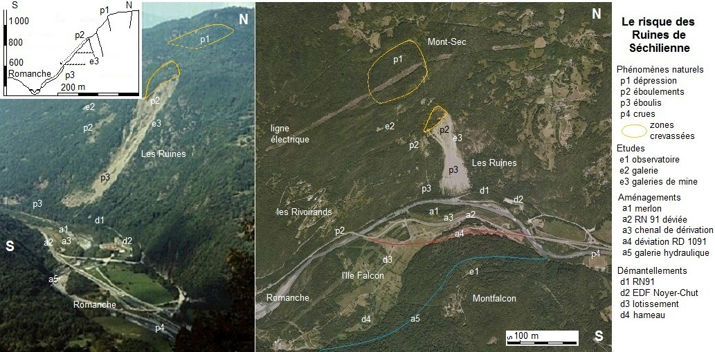 Site du risque des Ruines de Séchilienne - France, Isère